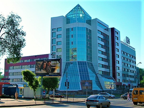 La centro pri ekspluatado de naturaj resursoj honore al V.I. Ŝpilman (Tjumeno, Rusio) Институт им. В. И. Шпильмана (перекрёсток улиц Малыгина и Холодильная)